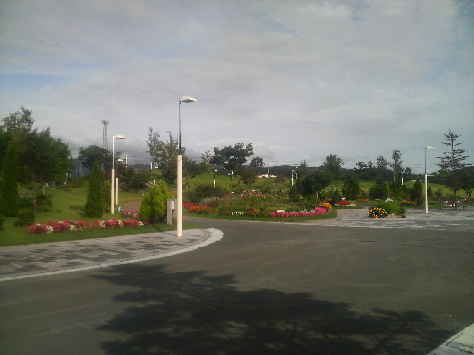 山形県新庄市屋内運動施設「すぽーてぃあ」（かむてん公園）